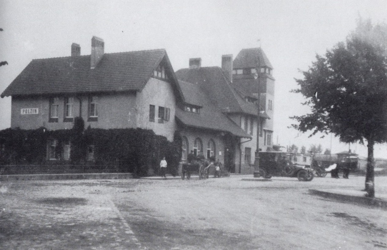 Polzin (Połczyn Zdrój) Dworzec klejowy